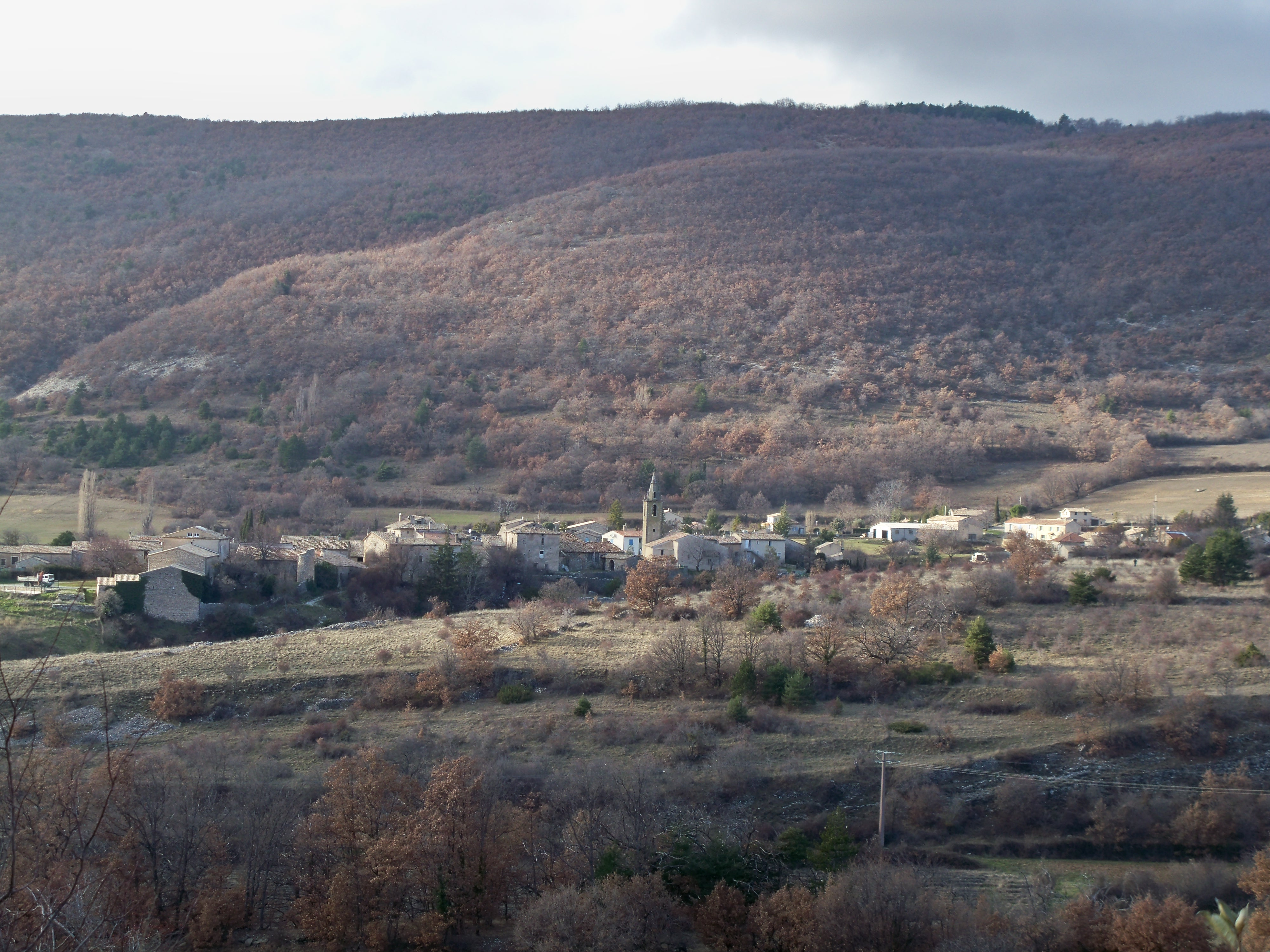 vue générale sur Saumane (04), France